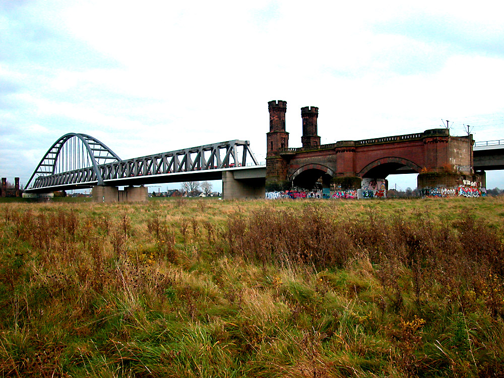 2 Brücke dirch Rhein (Hammer Eisenbahnbrücke)